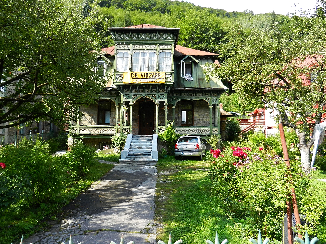 Casa Constantin Davidescu